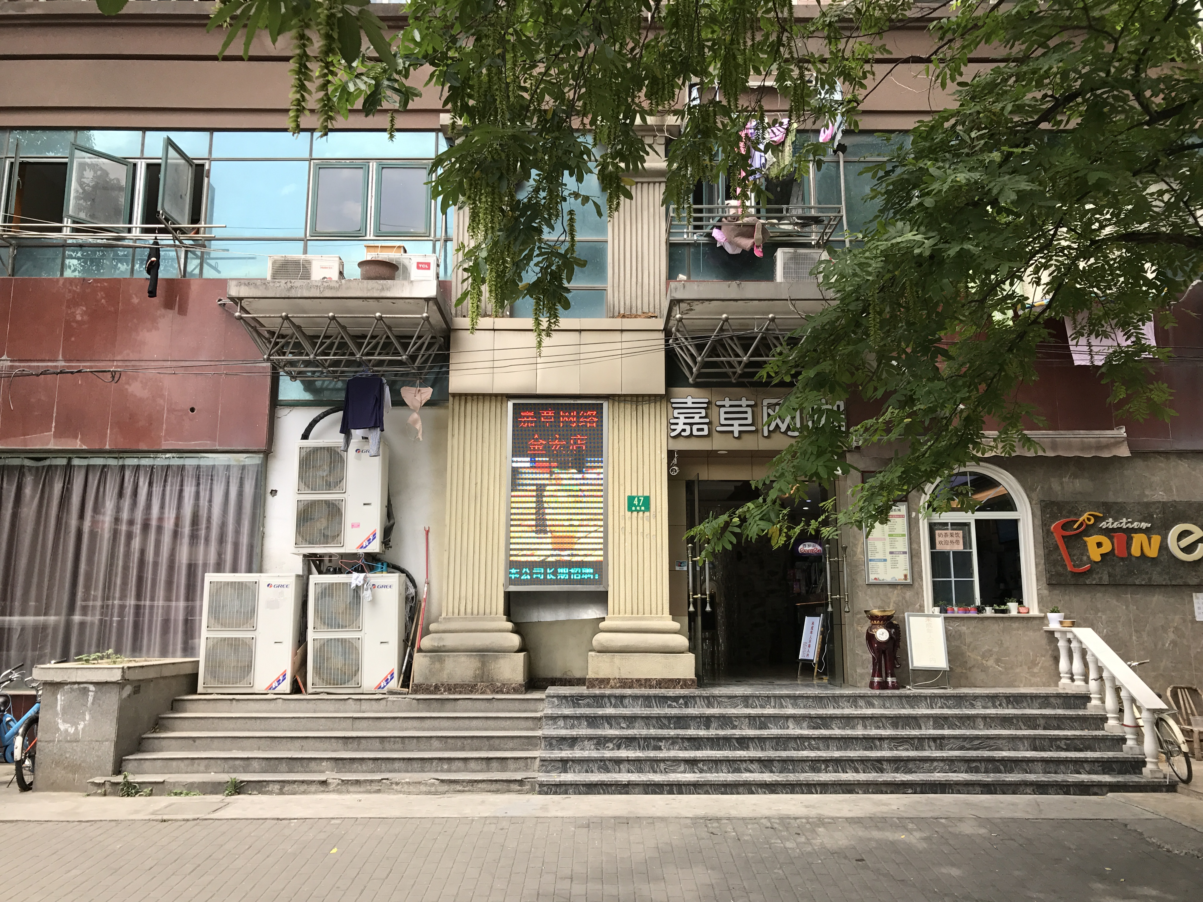 中文（中国大陆）: 上海道台衙门遗址 金坛路47号